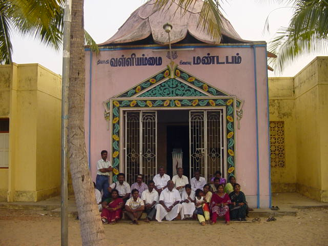 காந்திக்கு தென்னாப்பிரிக்க விடுதலைப் போராட்டத்தில் உந்துதலாக அமைந்த இந்திய தமிழக மங்கை தில்லையாடி வள்ளியம்மை பிறந்த அந்த ஊரில் பின்னாளில் காந்தியடிகள் வந்திருந்து அந்நினைவைக் கொண்டாடினார். அதன் அடையாளமாகத் தில்லையாடியில் காந்தி நினைவு மண்டபம் ஒன்று கட்டப்பட்டுள்ளது. அதை விளக்கும்படம்.